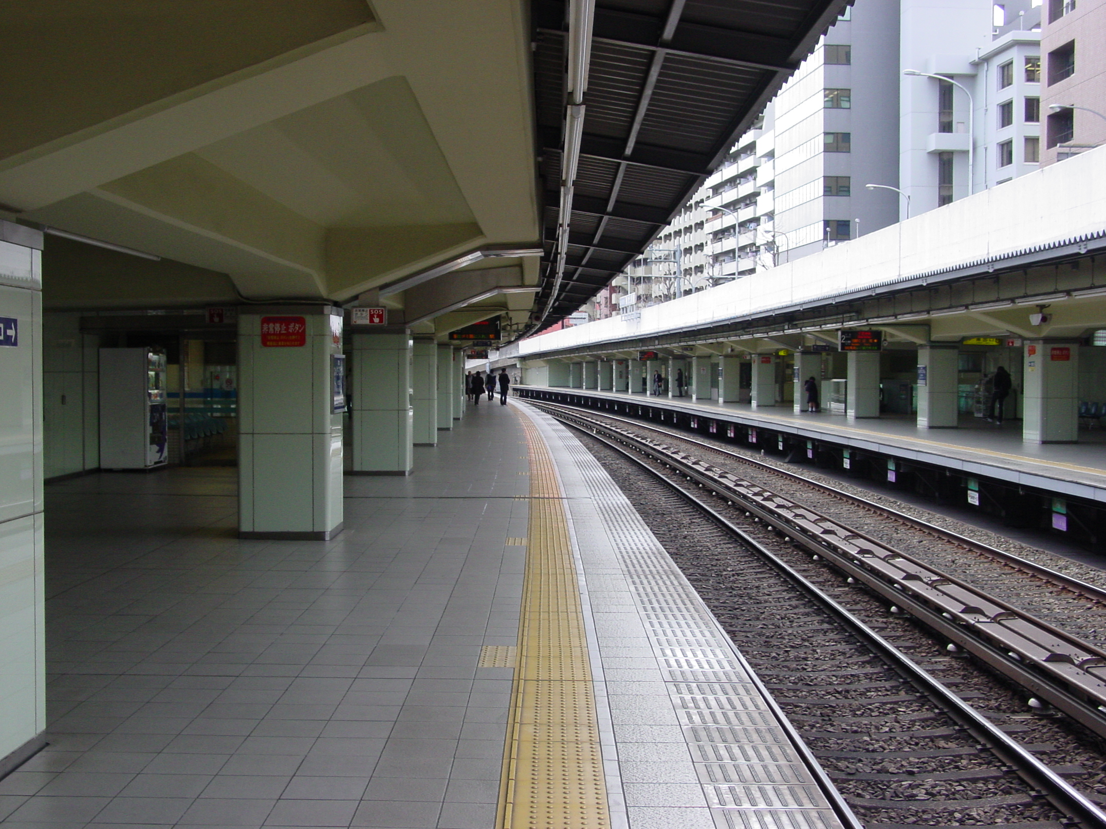 緑地公園駅のプラットホーム